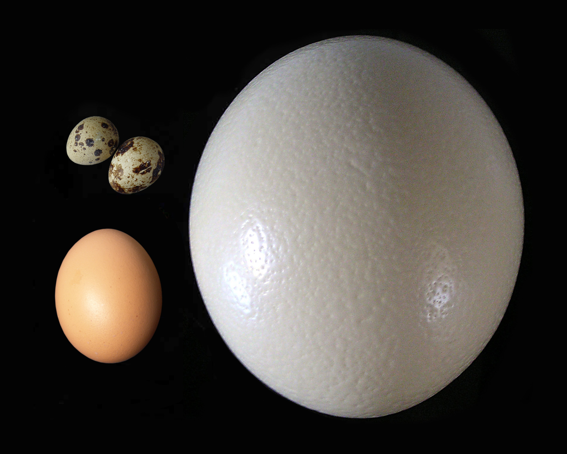 Eier von Wachtel, Haushuhn und afrikanischen Strauß [Ostrich egg (right), compared to chicken egg (lower left) and quail eggs (upper left)]